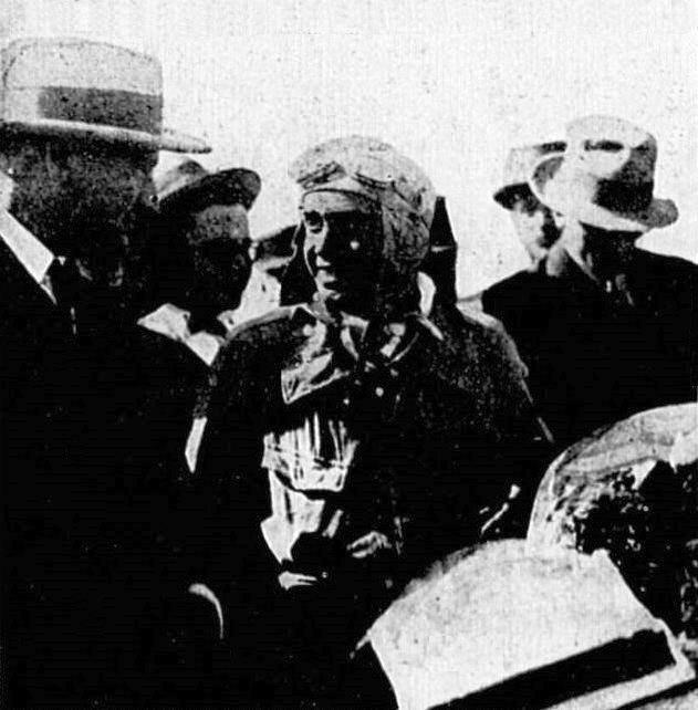 Charles Benitah, vainqueur du Grand Prix du Maroc 1930 sur Amilcar.